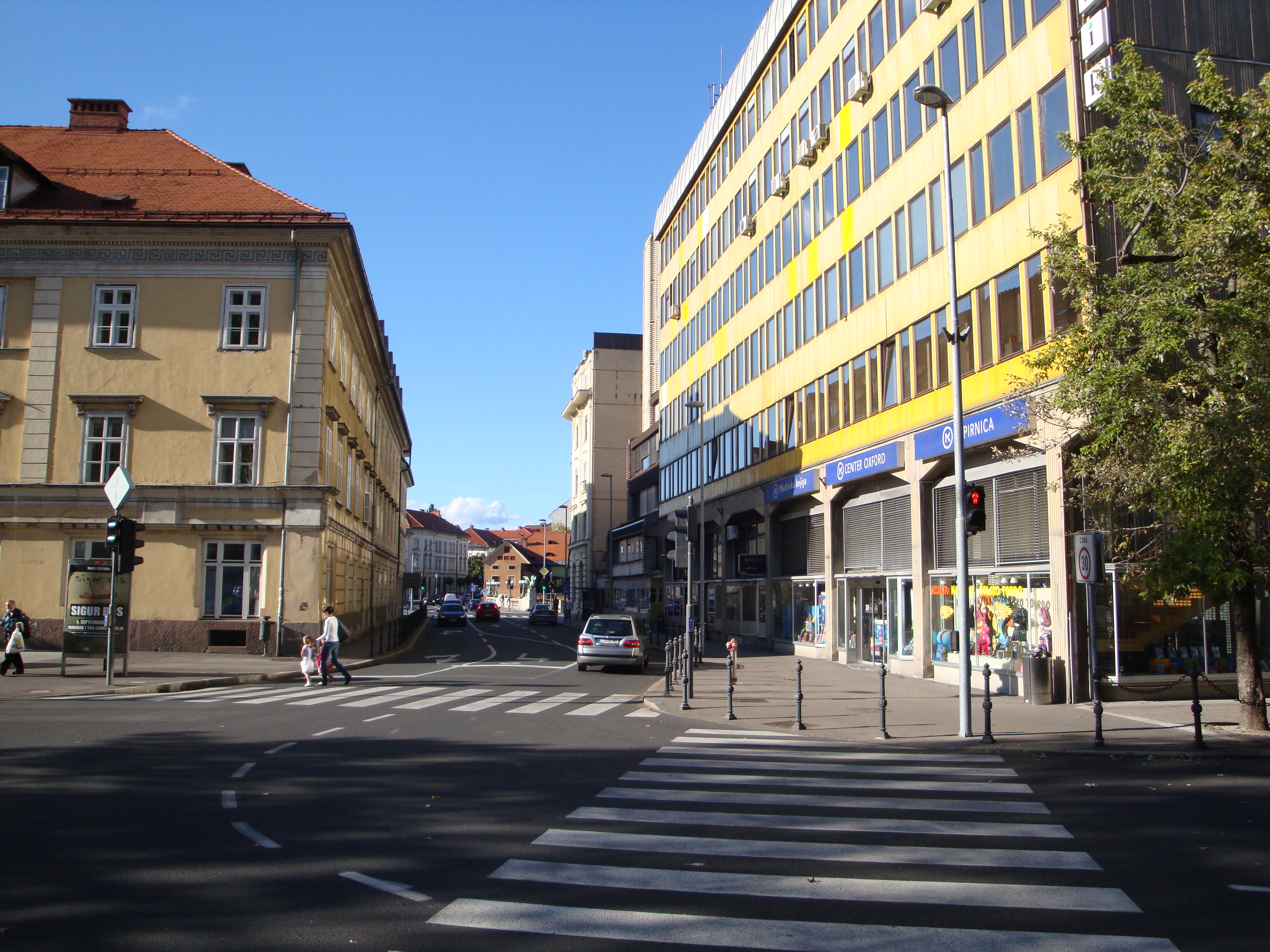 Kopitarjeva ulica v Ljubljani